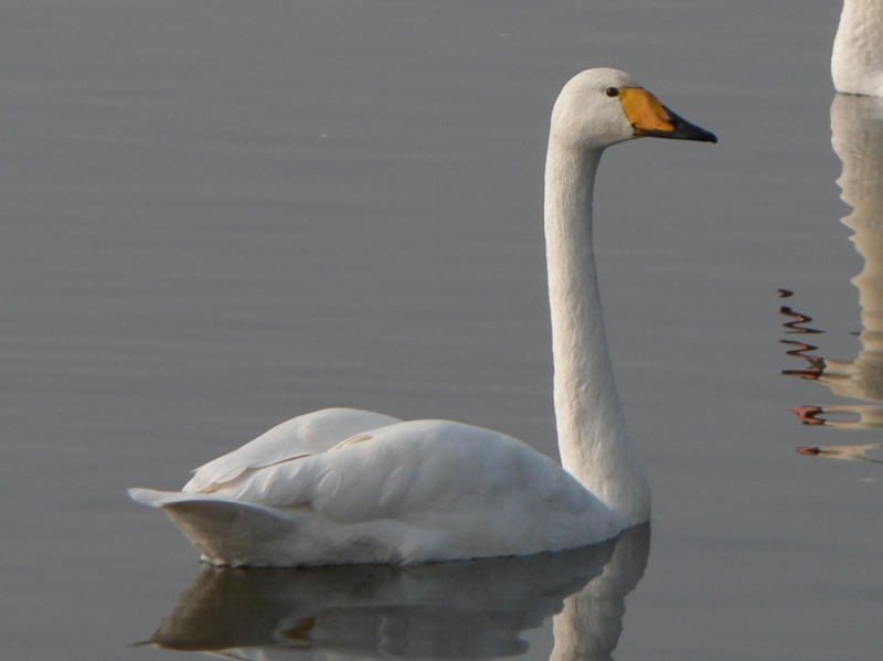 Labuť zpěvná na Šumvaldském rybníce